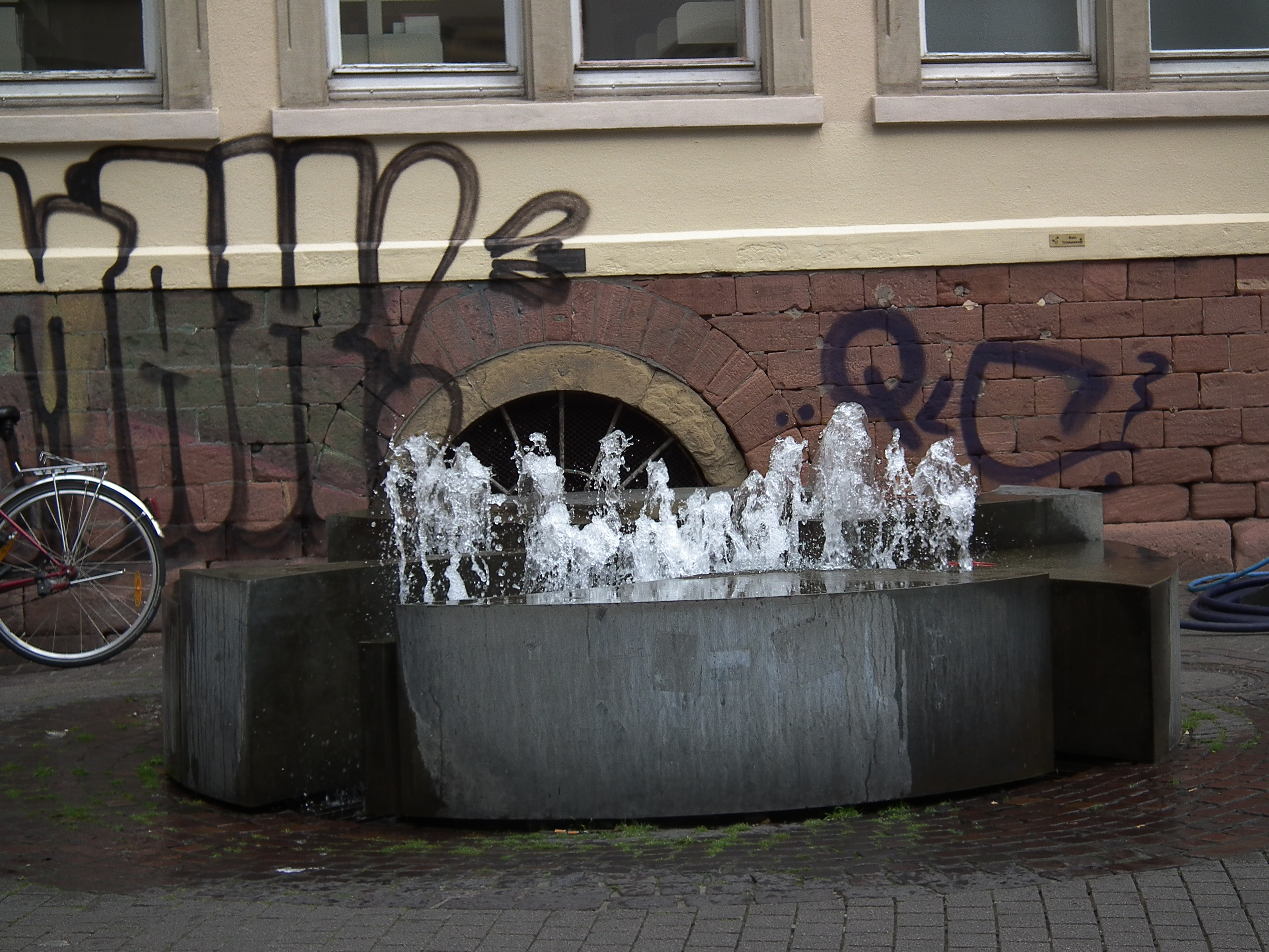 "Flower" von Klaus Horstmann-Czech (1977/1978), Springbrunnen in der Heidelberger Altstadt (Baden-Württemberg, Deutschland)